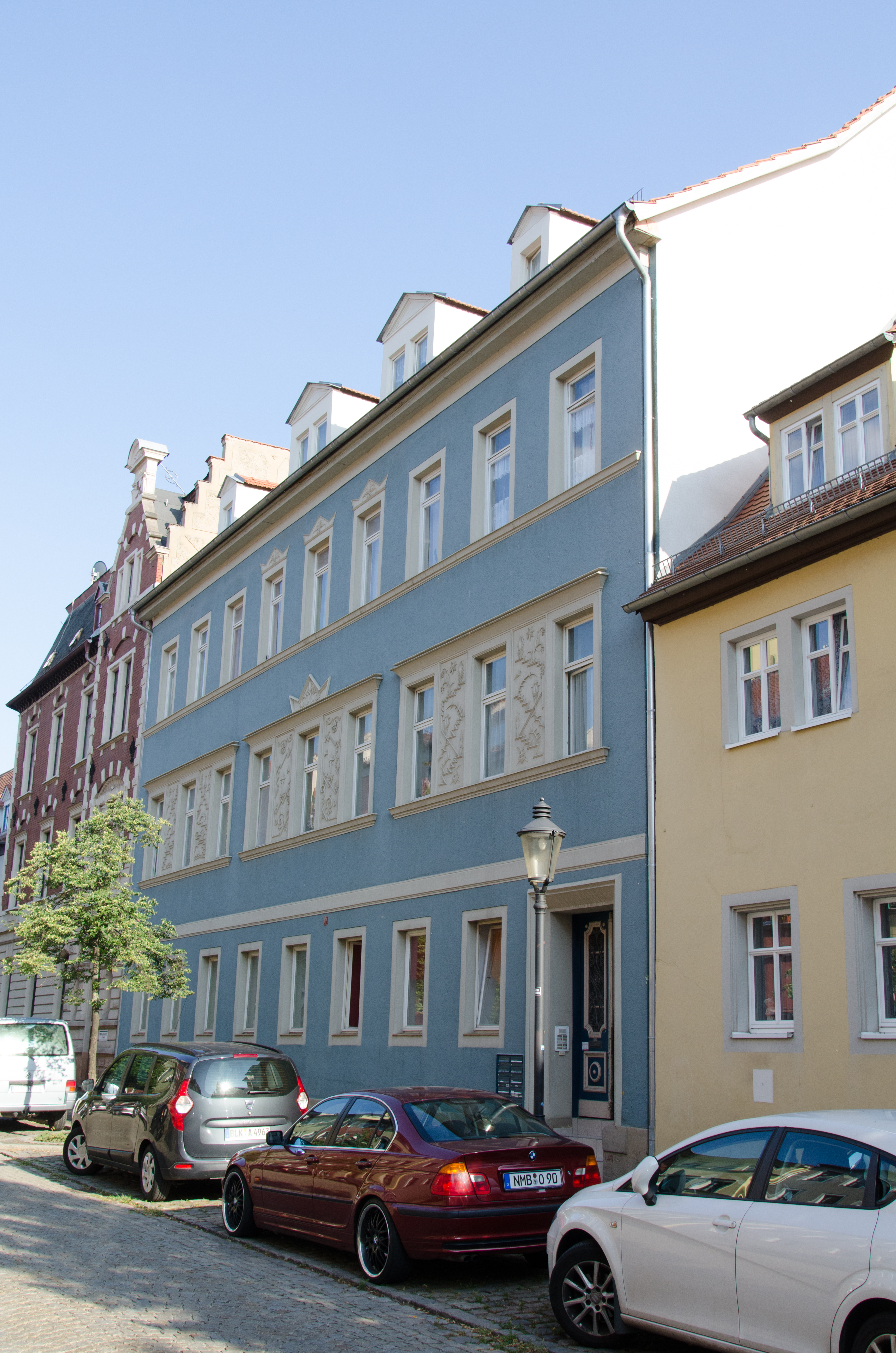 Naumburg, Fischstraße 22